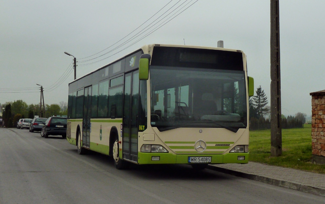 Mercedes O530 CLA Chełm